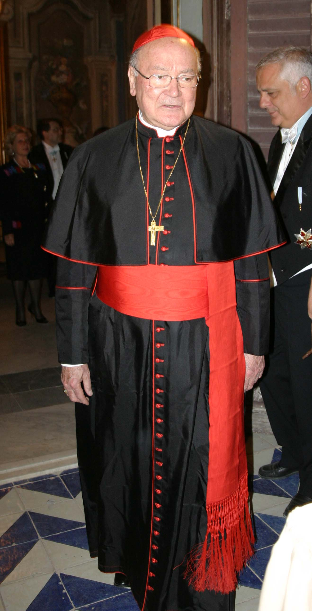 Renato Raffaele Martino